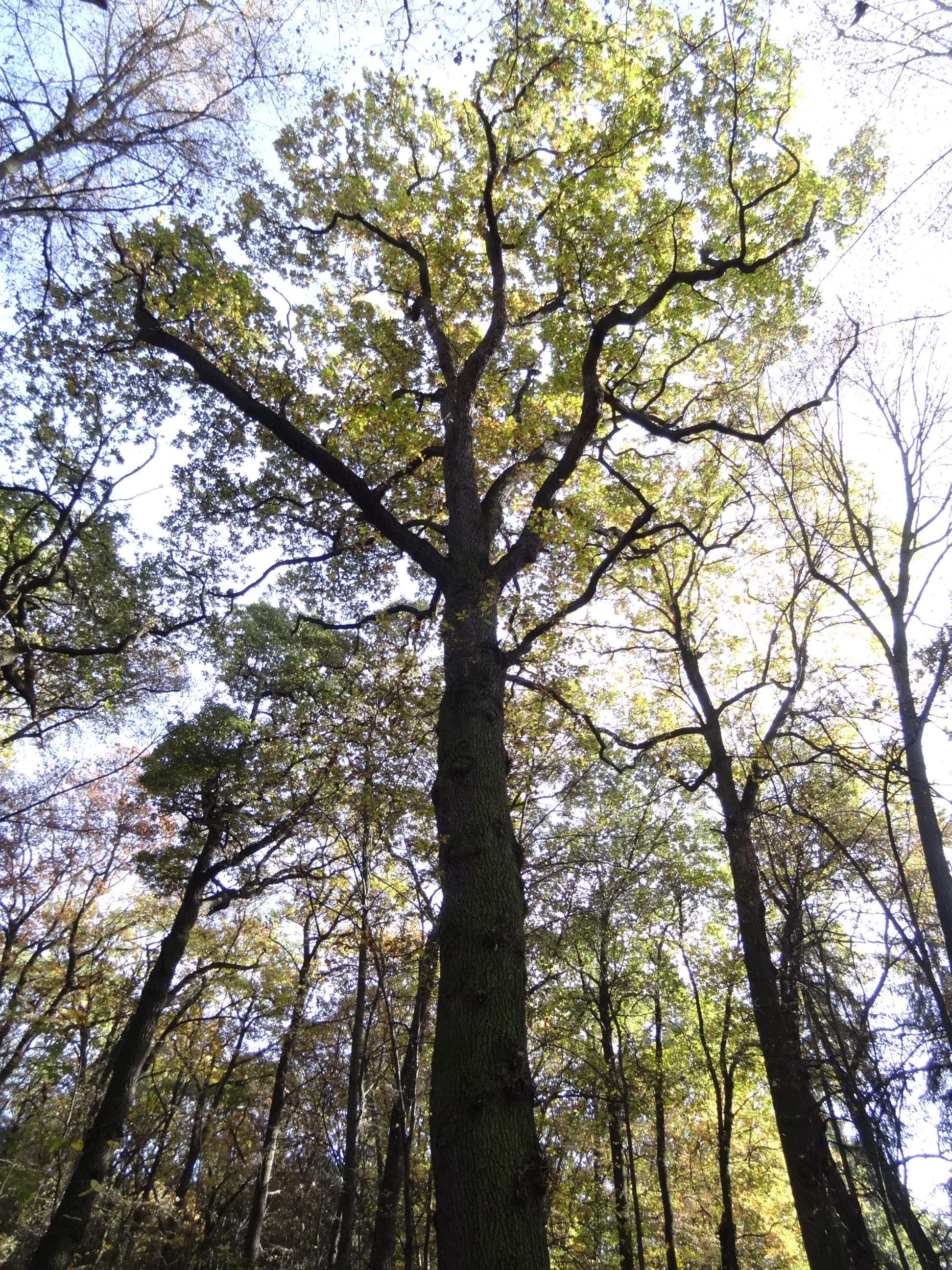 Kunratice - památný dub letní v Kunratické bažantnici